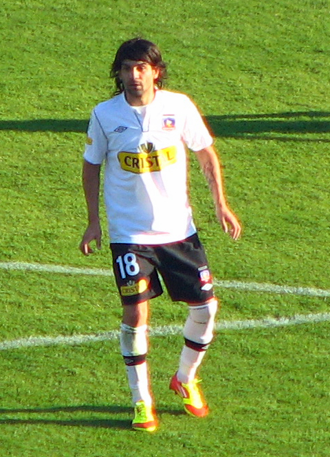 Lucas Wilchez con la camiseta de Colo Colo, en el partido que enfrentó a su club con la U de Chile el 29 de abril de 2012 en el Estadio Nacional.